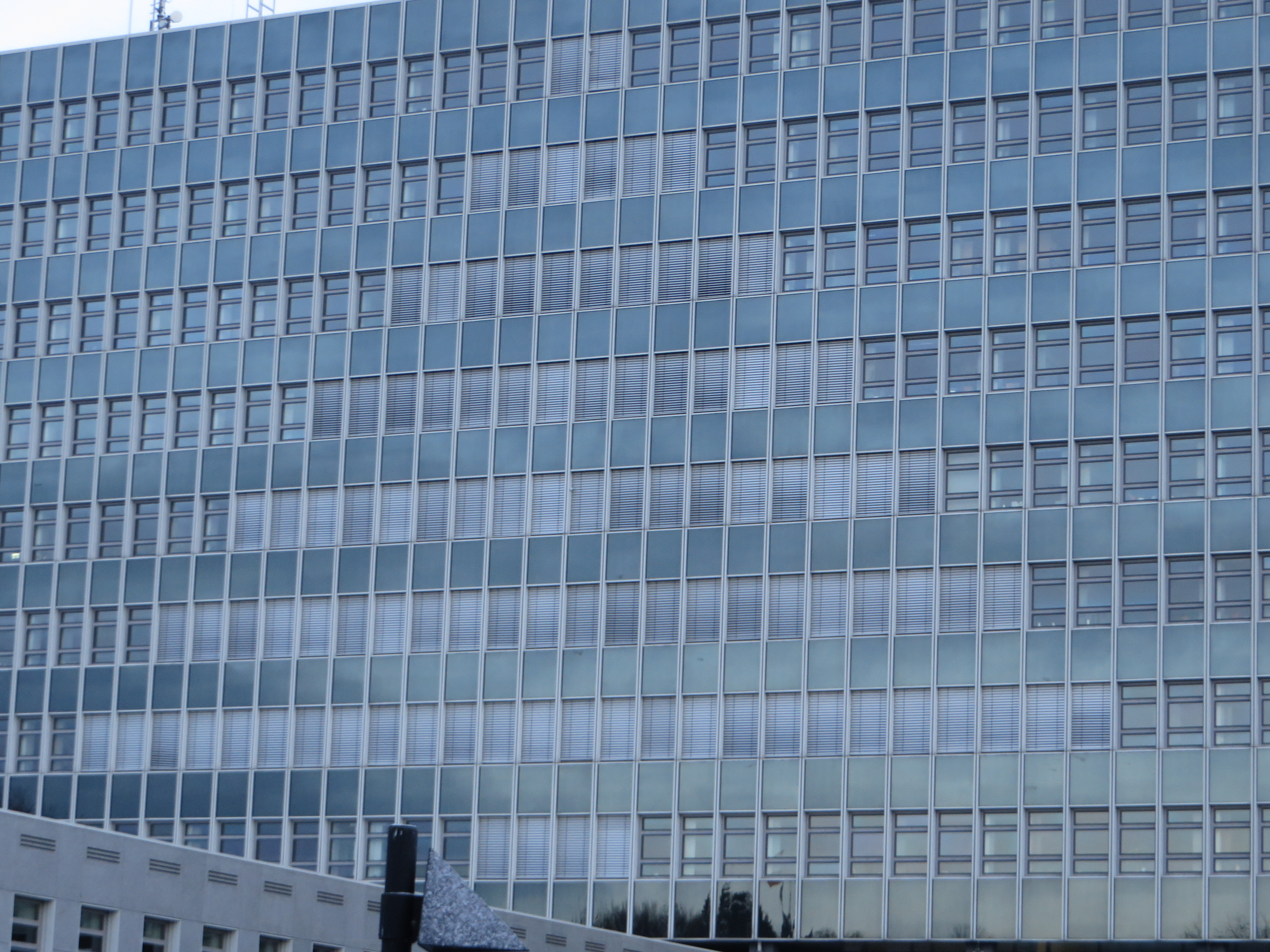 KBA-Tannenbaum (Flensburg-Mürwik, Weihnachten 2014), Bild 07